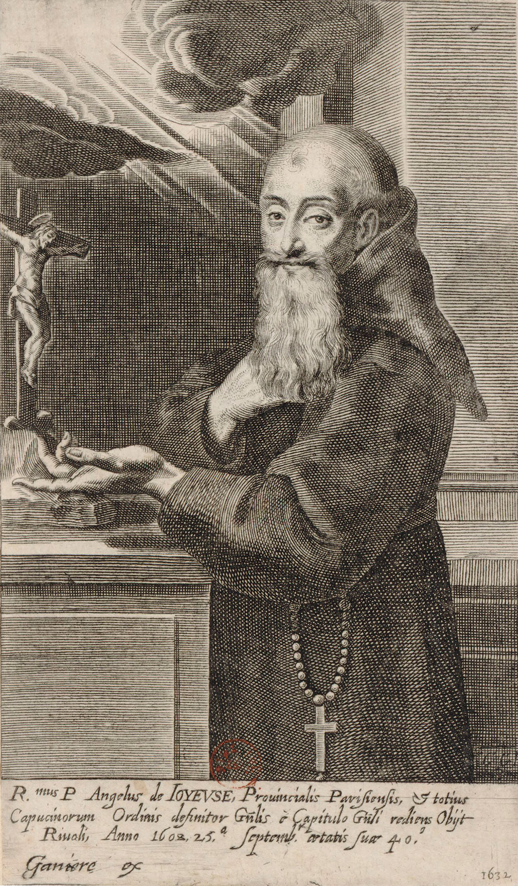 Henri de Joyeuse, dit le père Ange en religion.